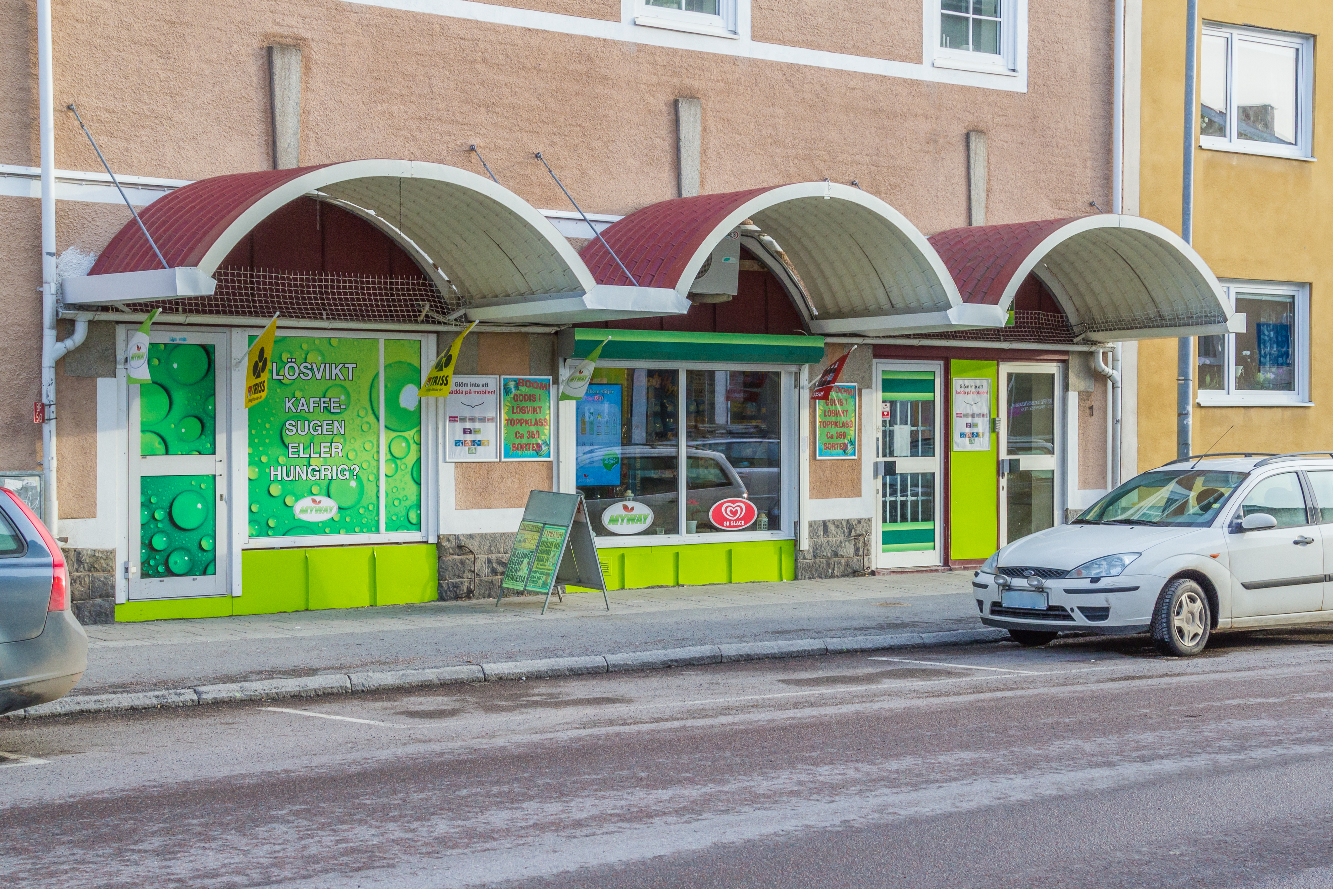 Hedemora, Dalarnas län, Sverige